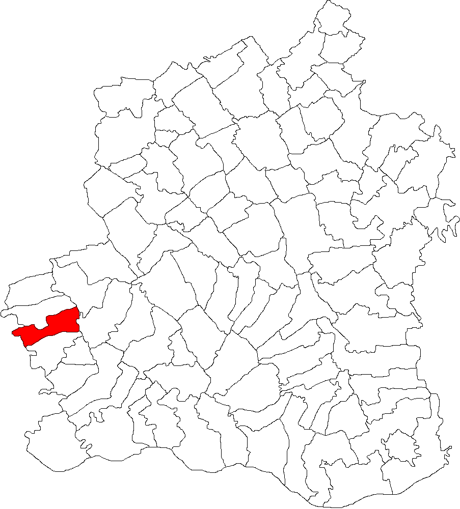 Categorie:Hărţi ale judeţului Teleorman